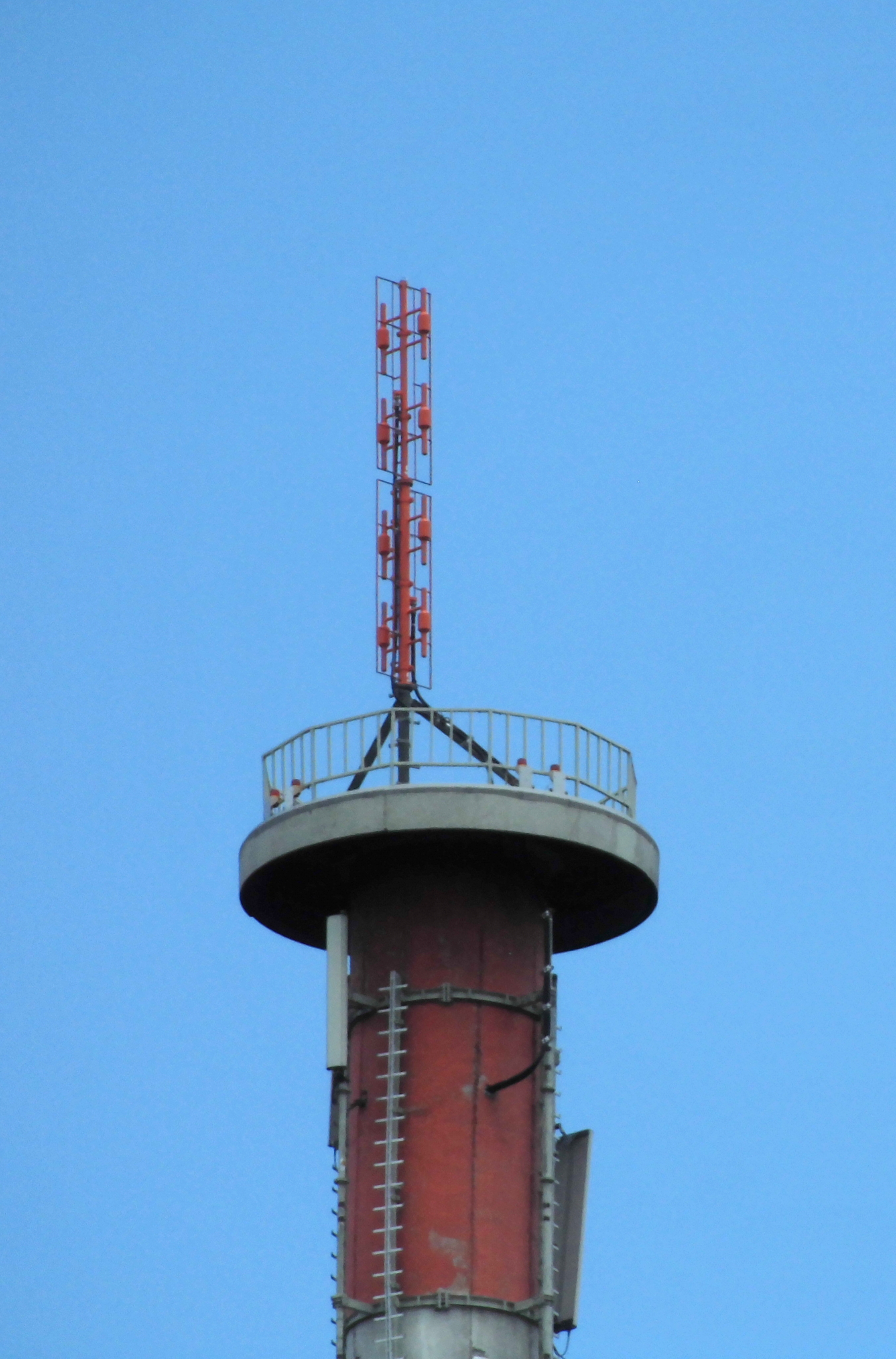 Detailaufnahme der DAB+ Antenne des Fernmeldeturms Eisernhardt.